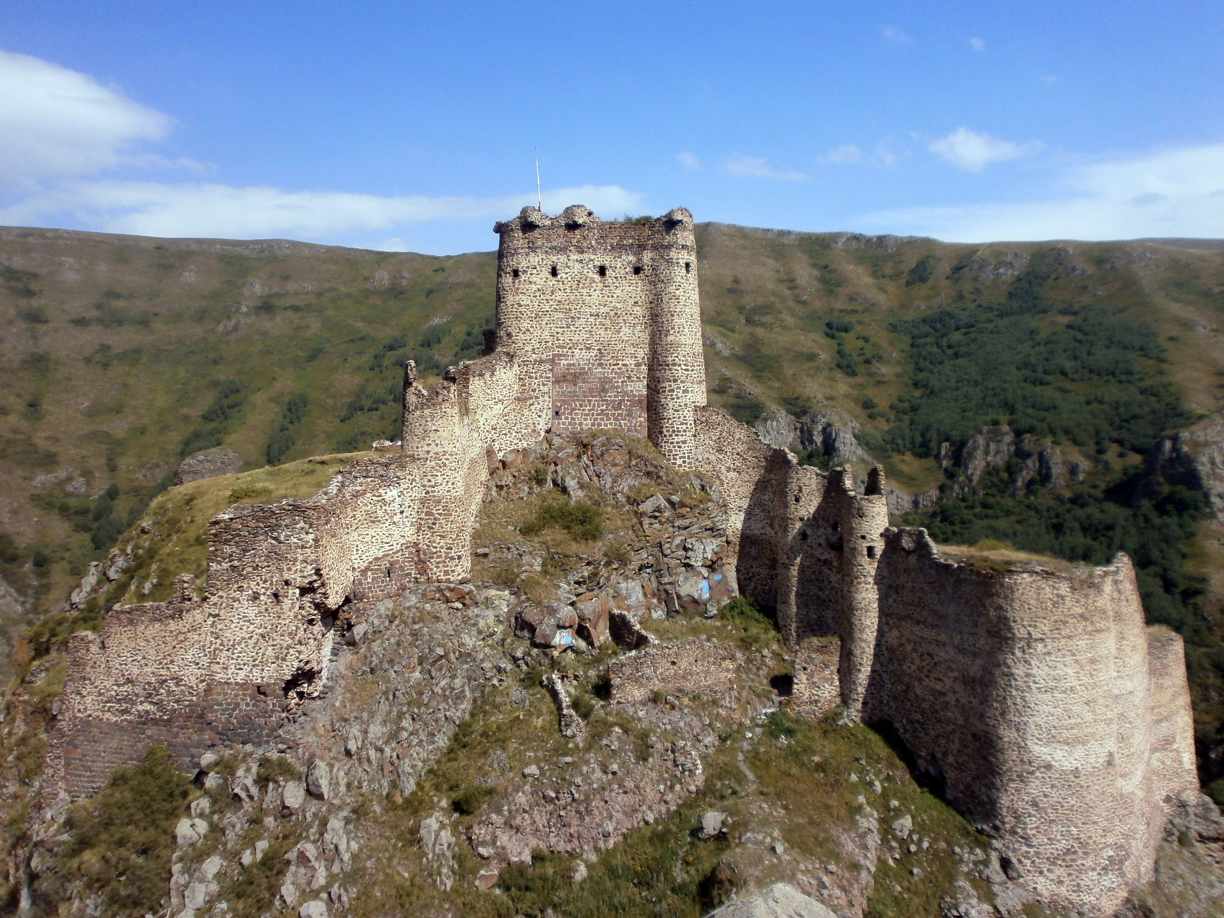 ქაჯის ციხე